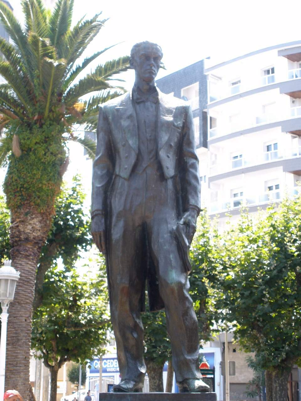 Castro Urdiales - Monumento a Ataúlfo Argenta